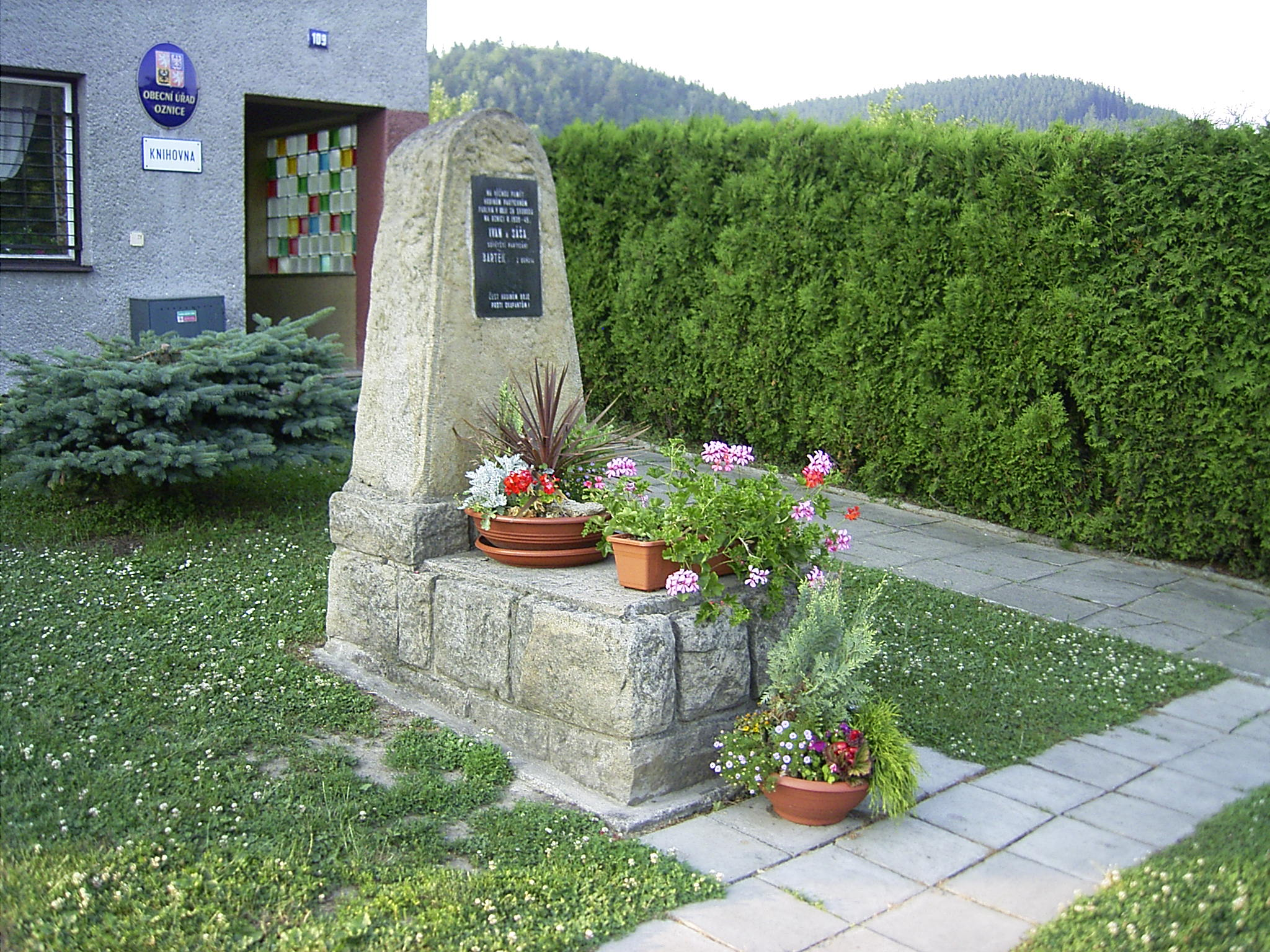 Oznice (okres Vsetín) - památník padlých partyzánů